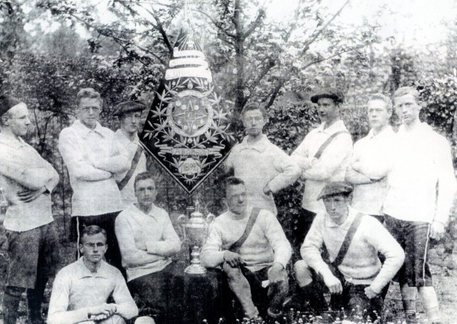 Vitesse na viering eerste lustrum